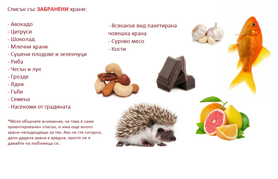 Забранени и опасни храни за Африканския мини таралеж